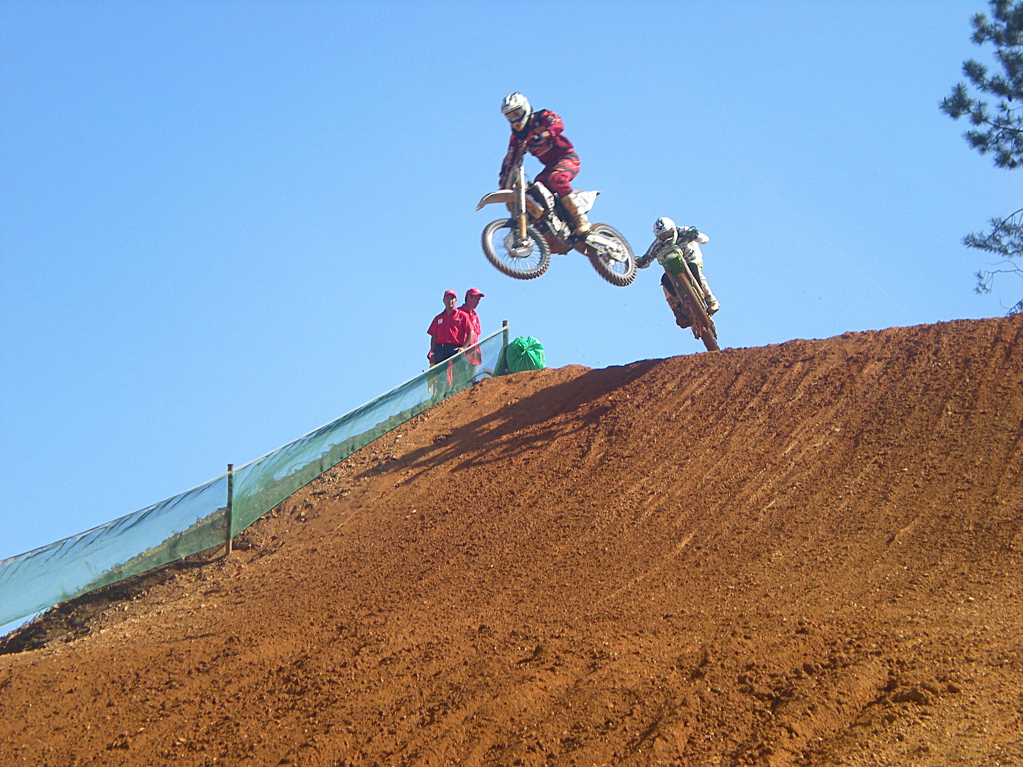 Campionato do mundo de motocross en Estoril